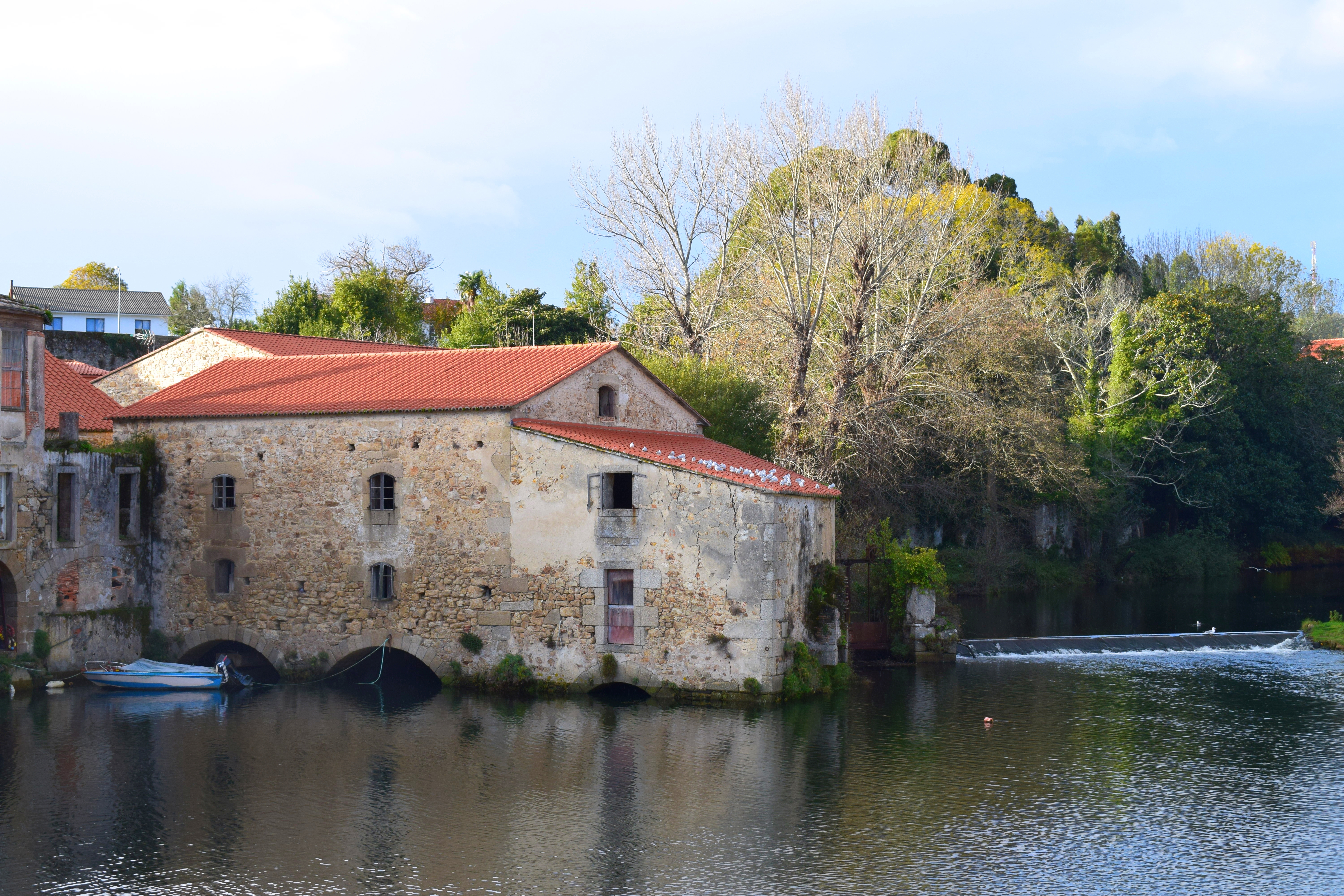 Xubia - Castro. Desembocadura del Rio Xubia, en Neda. This is a photography of a Special Area of Conservation in Spain with the ID: ES1110013. Natura2000 entry, EEA entry